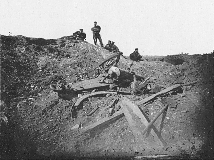 Deutsch-Französischer Krieg, Belagerung von Straßburg, zerschossenes Geschütz Bastion 12a